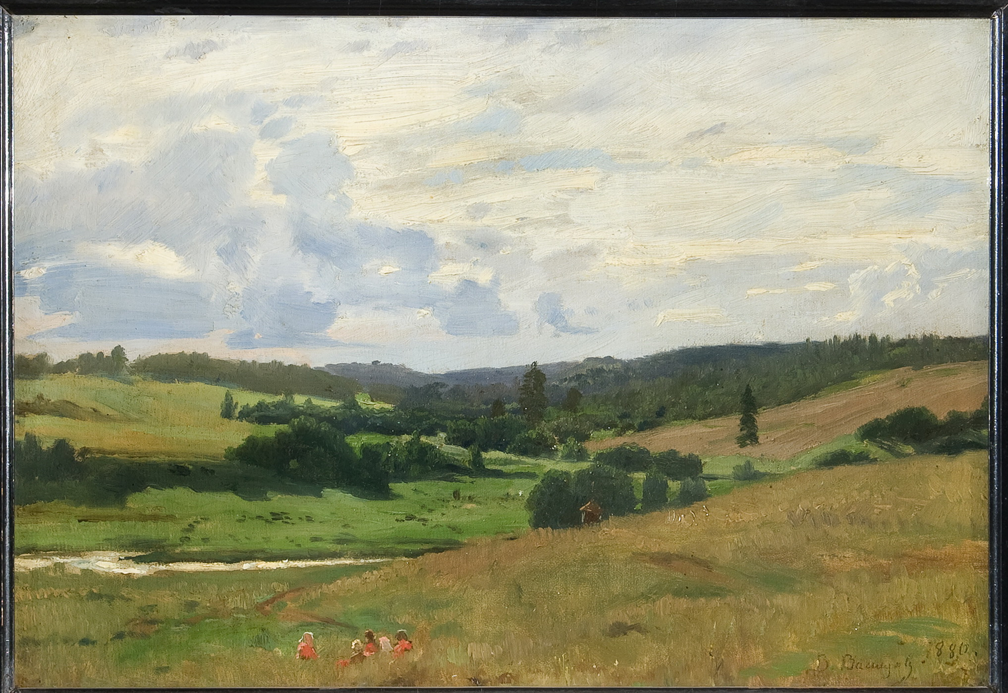 Долина речки Вори у деревни Мутовка, пейзаж с детьми